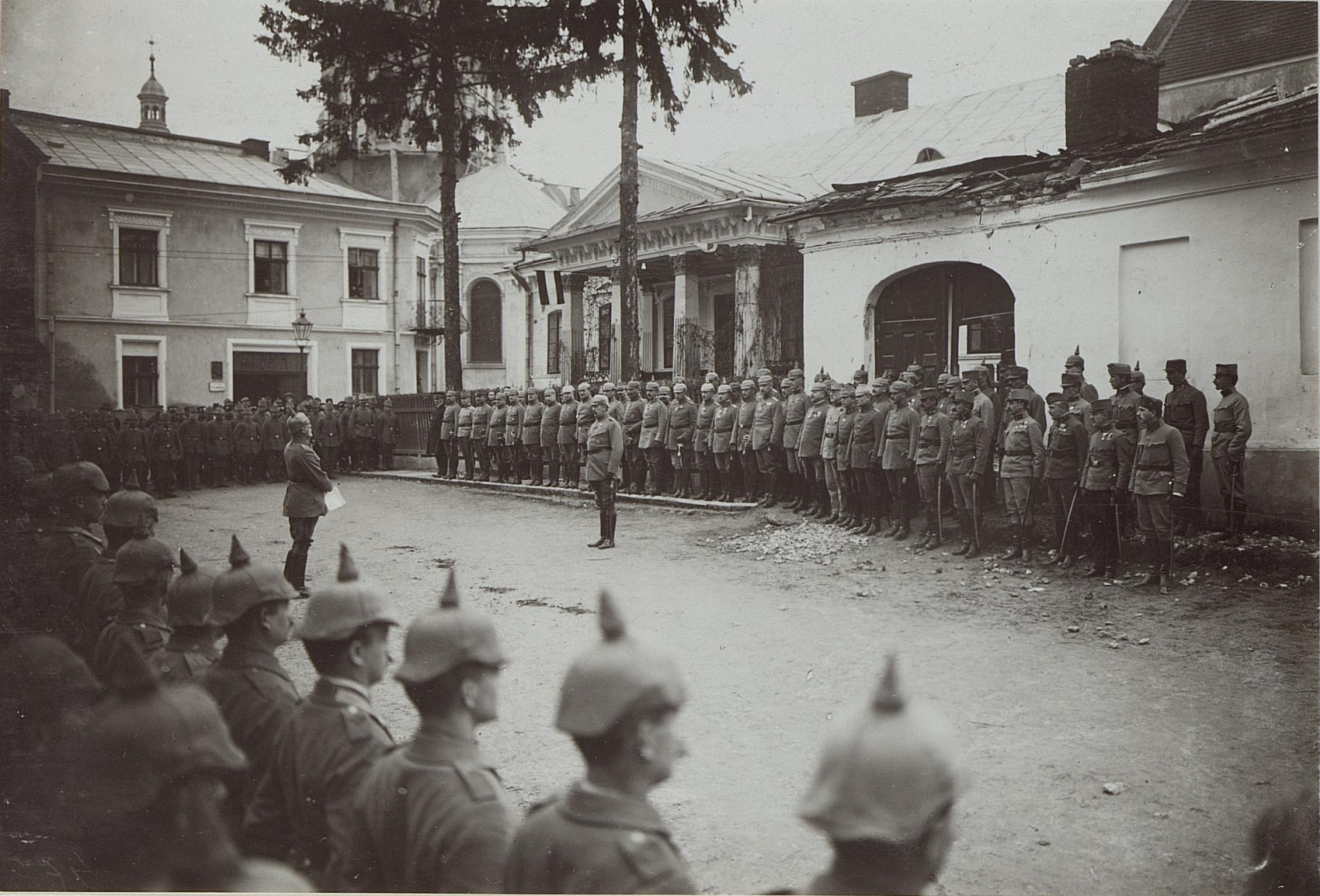 Dekoration des Generalstabschef der deutschen Südarmee, Hans Ritter von Hemmer mit dem bayrischen Militär-Max-Josef-Orden